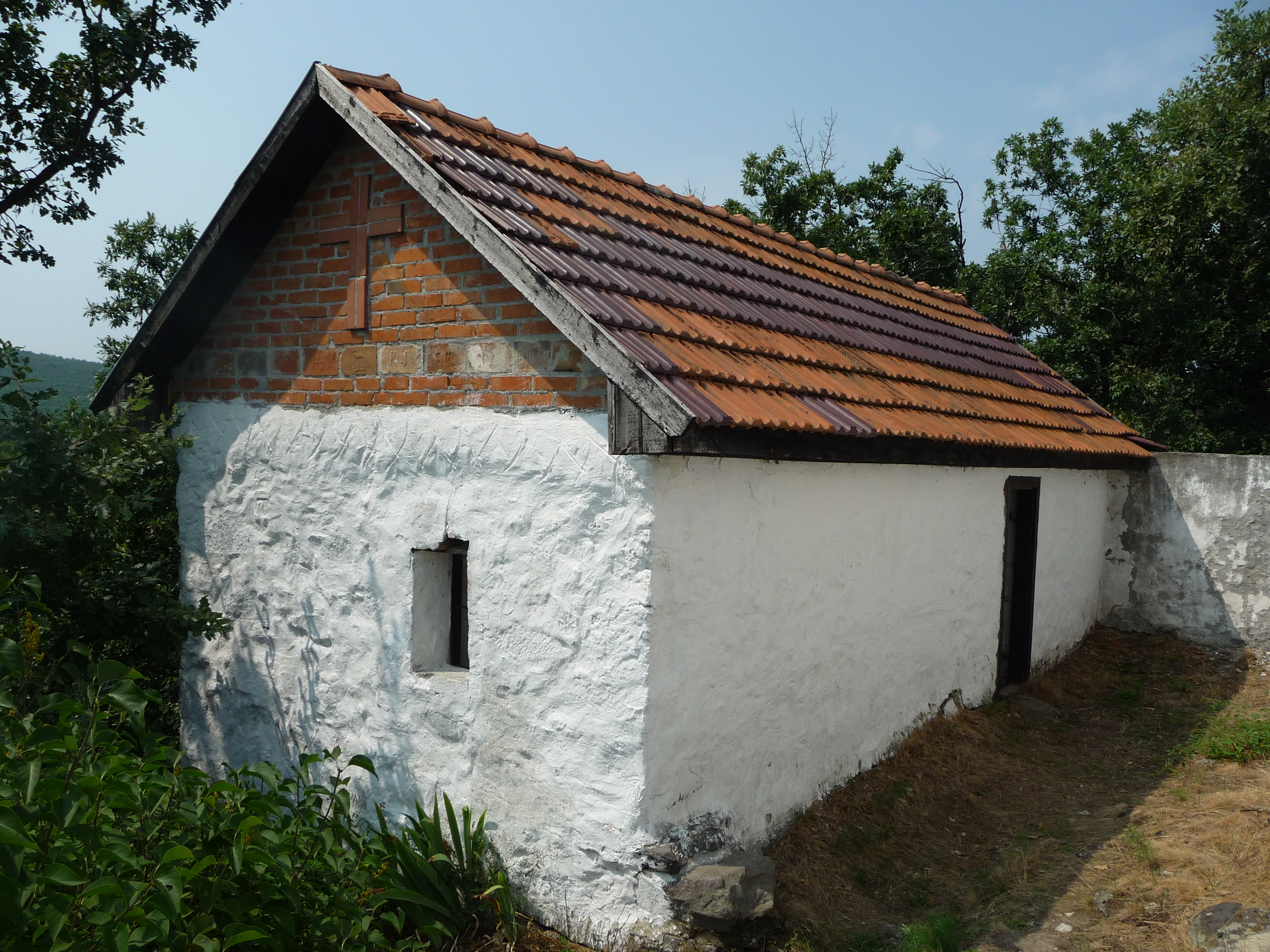 A „remetelak”. Habár neve alapján vallási épület valójában a kápolna gondnoka használta mint lakást. Műemléki azonosító: 11436, ÉS 'Szent Anna-kápolna és remetelak' címmel is védett Műemléki azonosító: 6548, törzsszám: 5732. - Buják, Kálváriahegy, a Szent Anna-kápolna déli oldalánál, azzal párhuzamosan áll.